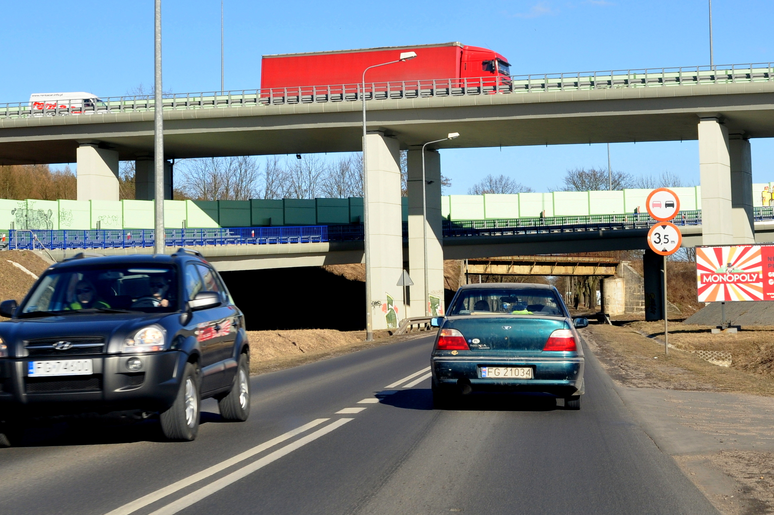 Gorzów Wlkp. Widok z DW132 na węzeł drogowy "Gorzów Wlkp. Zachód" na drodze ekspresowej S3. W tle - wiadukt linii kolejowej 415, dziś nieistniejący.